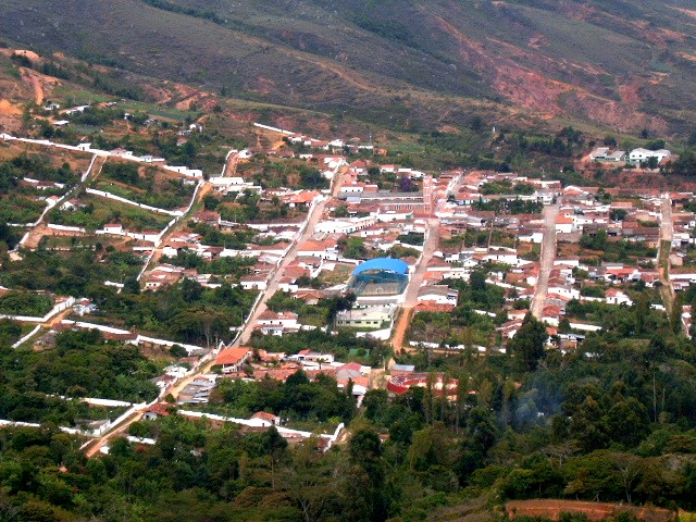 Panorámica de Betulia, Santander, Colombia